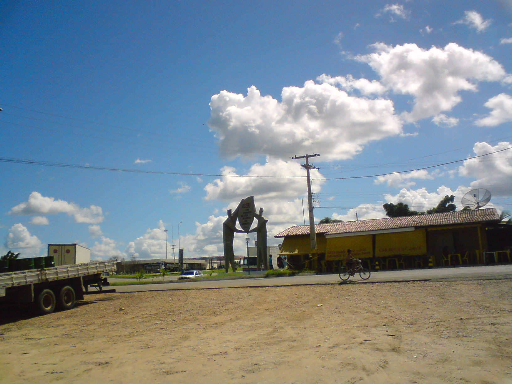 Estátua de granito nos arredores da entrada de Assu, Rio Grande do Norte